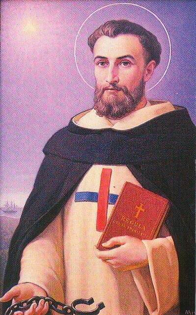 Jean de Matha, fondateur de l'Ordre de la Sainte Trinité